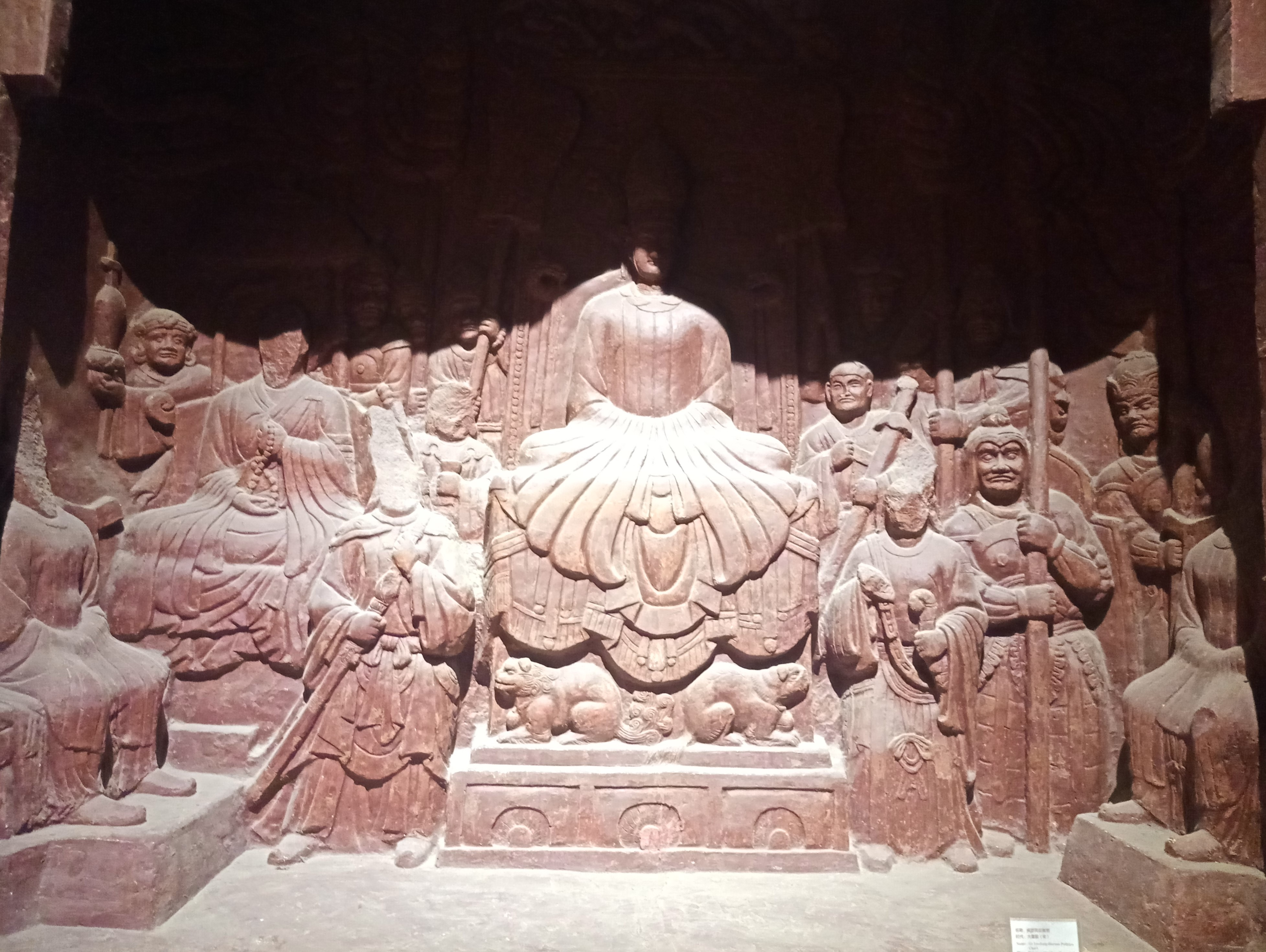 中文（中国大陆）: 大理州博物馆-大理国-阁罗凤议政图